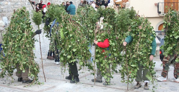 Autore: Fonte: Descrizione: Rumiti o Romiti Licenza d'uso: libera Note: nessuna